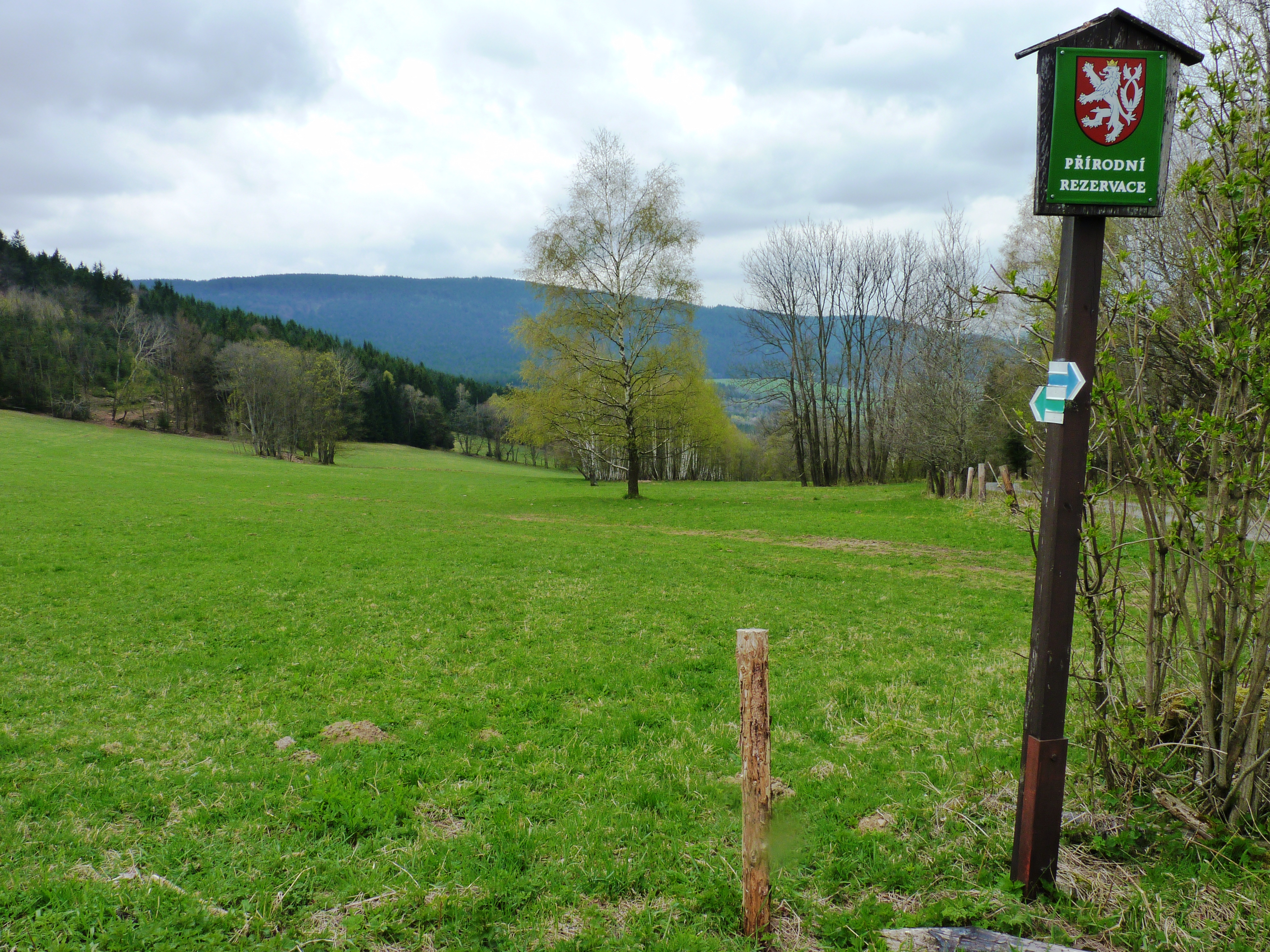 Přírodní rezervace Městišťské rokle.